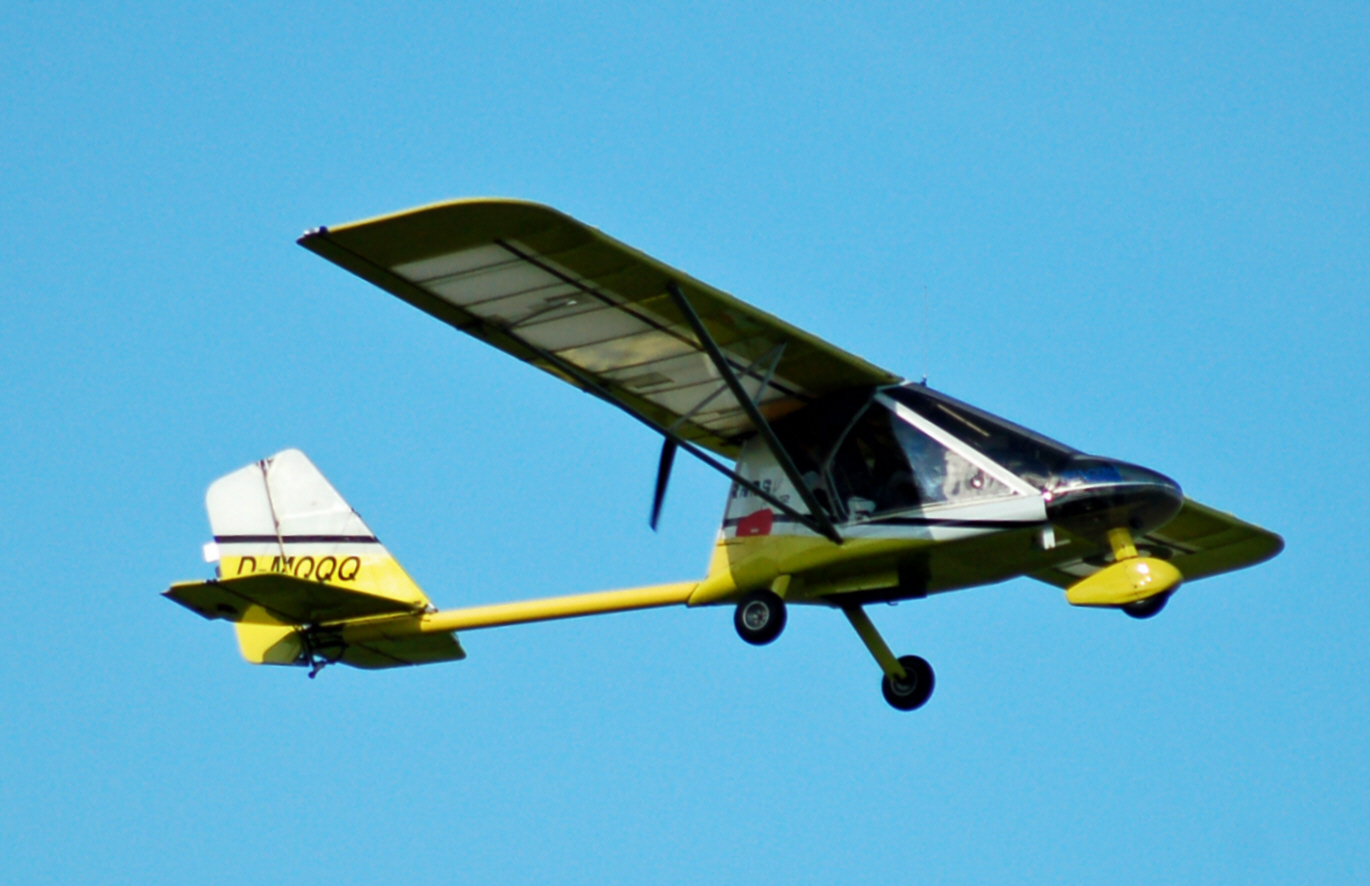 Rans S12 (D-MQQQ) über dem Flugplatz Uetersen